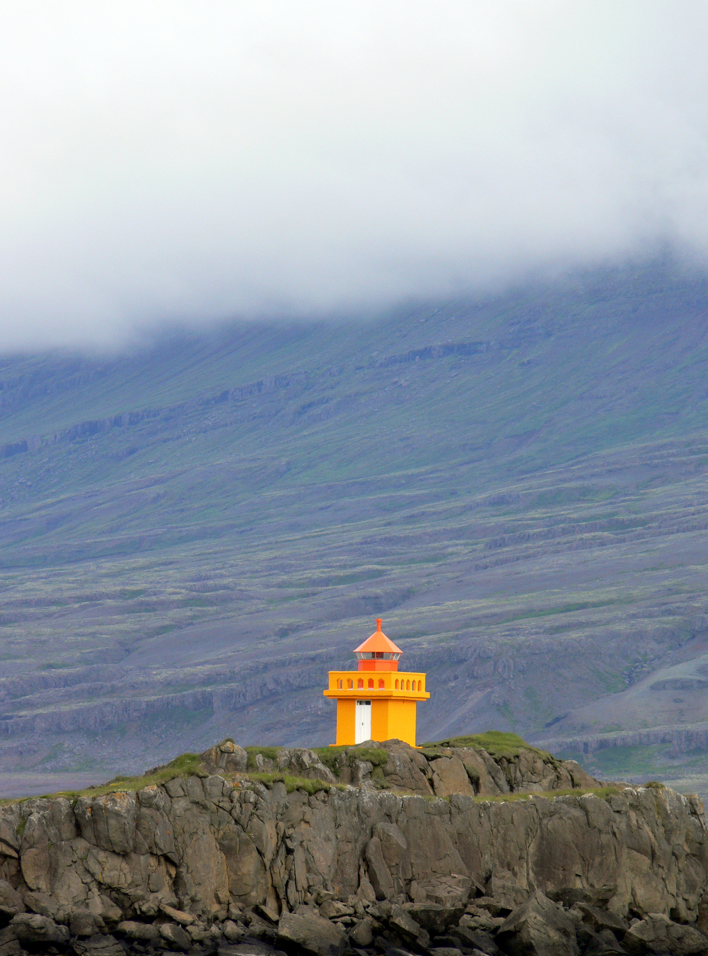 Djúpivogur Hafenfeuer